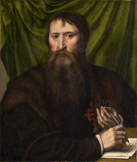 Felipe de Guevara, peinture à l'huile sur bois, hauteur : 55,9 cm, largeur : 47,6 cm, Williamstown, Clark Art Institute.